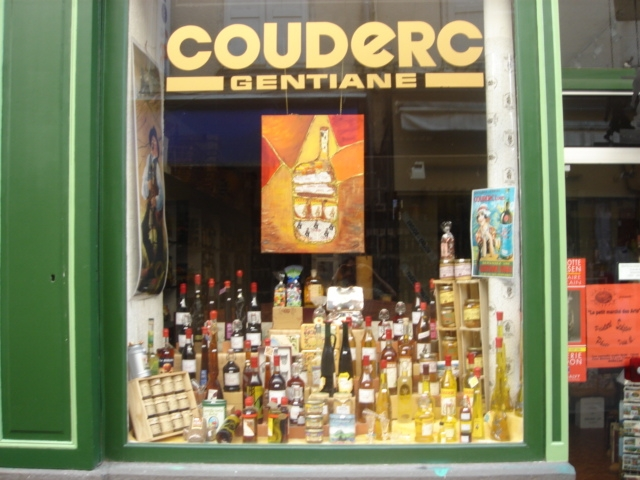 Boutique marchand de liqueur de gentiane